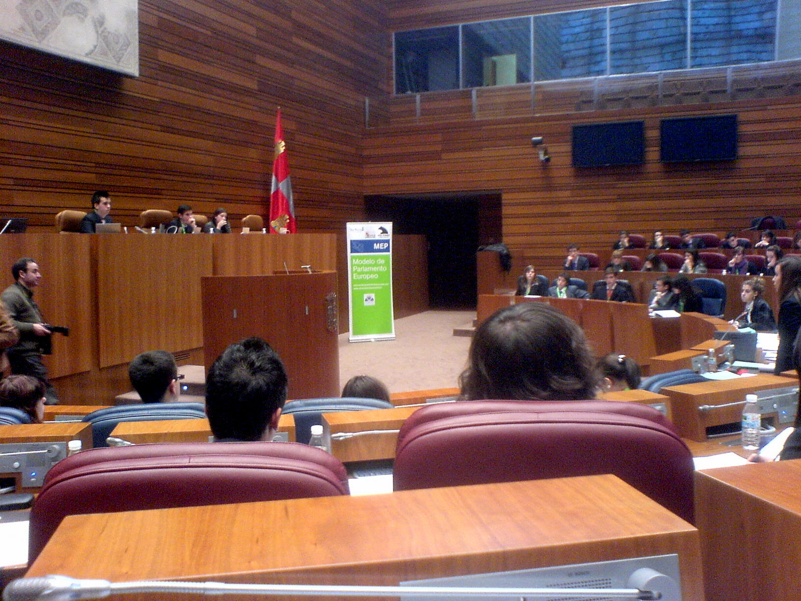 Sesión autonómica del Modelo de Parlamento Europeo celebrada en las Cortes de Castilla y León de Valladolid con representantes de Asturias, Cantabria y Castilla y León.